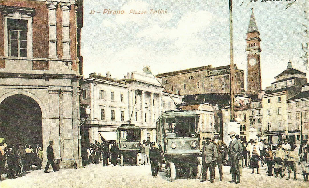 Razglednica Pirana.